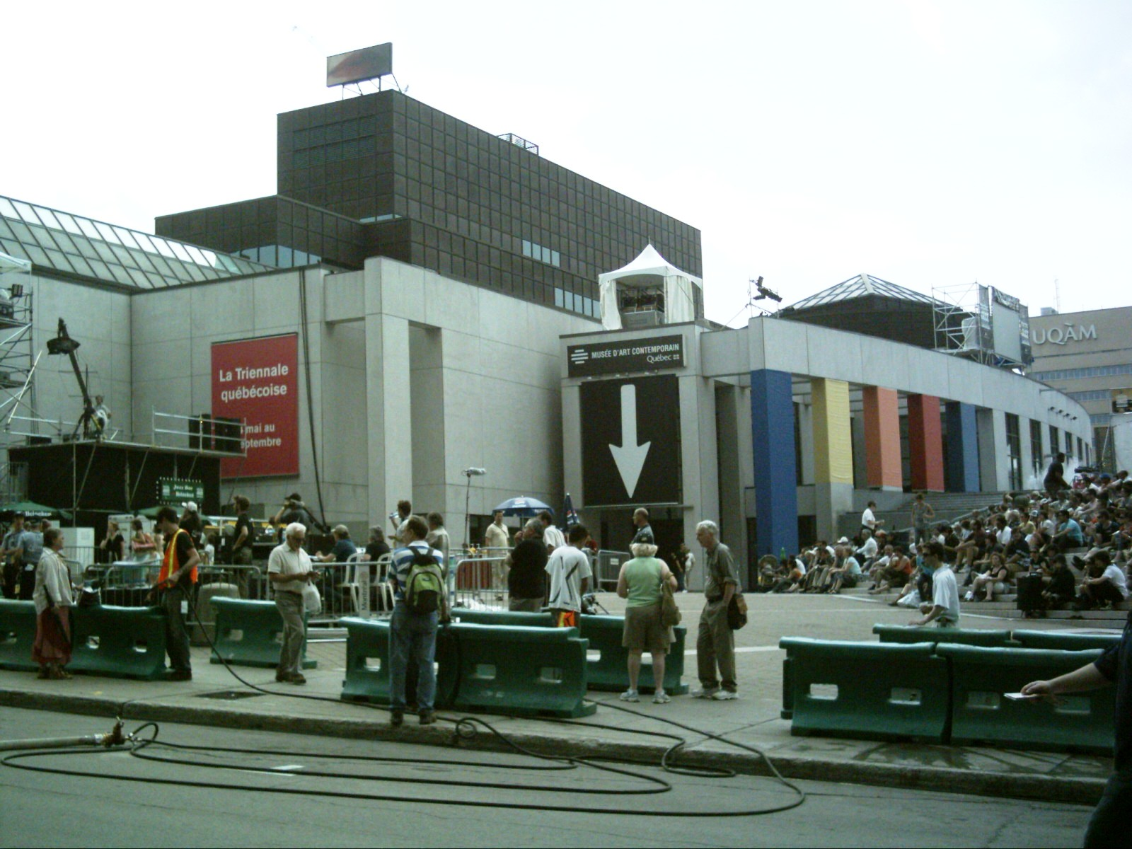 Le Musée d'art contemporain de Montréal sur le site de la Place des Arts.